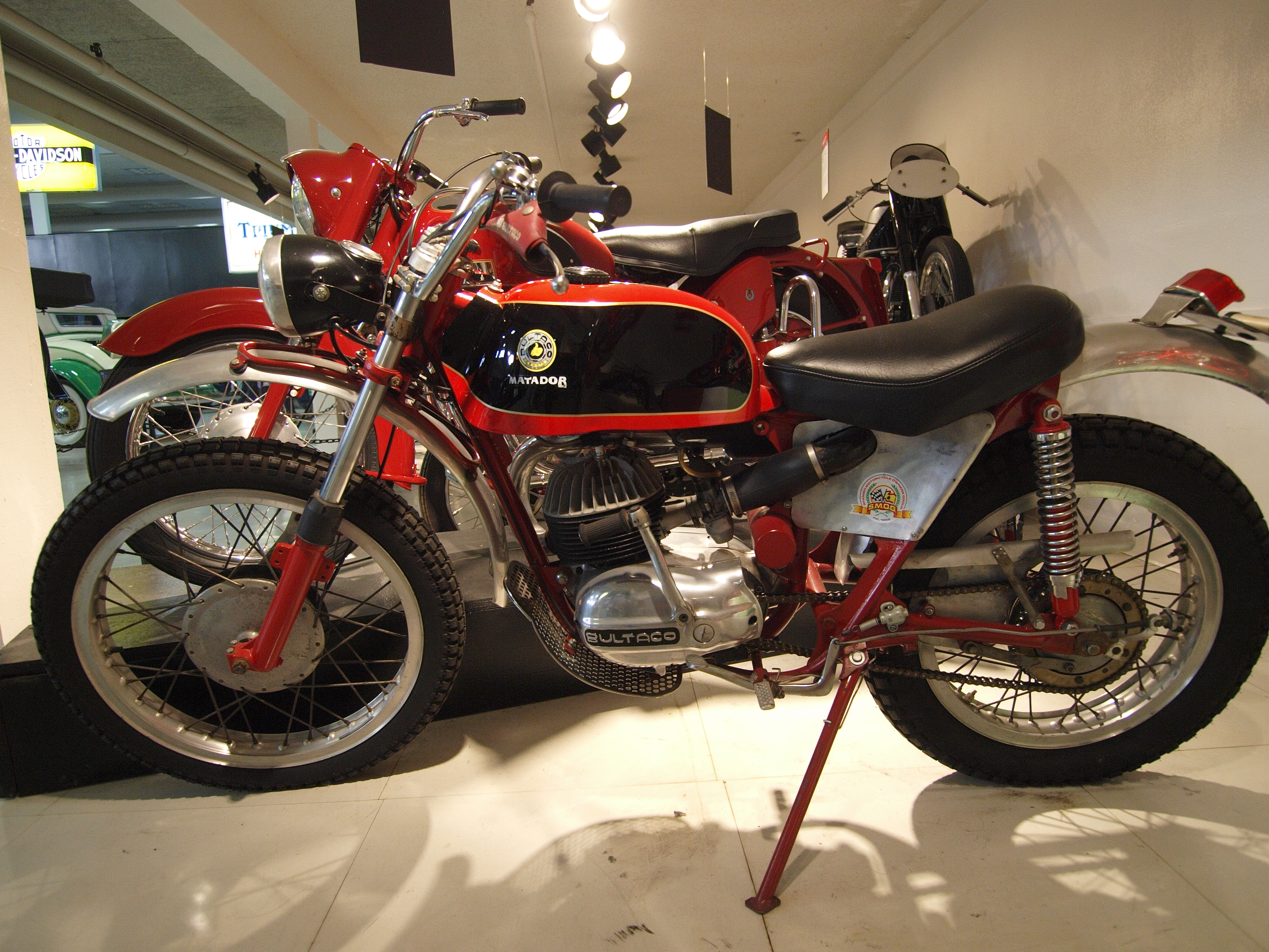 Bultaco Matador MK2 (1965-1967)